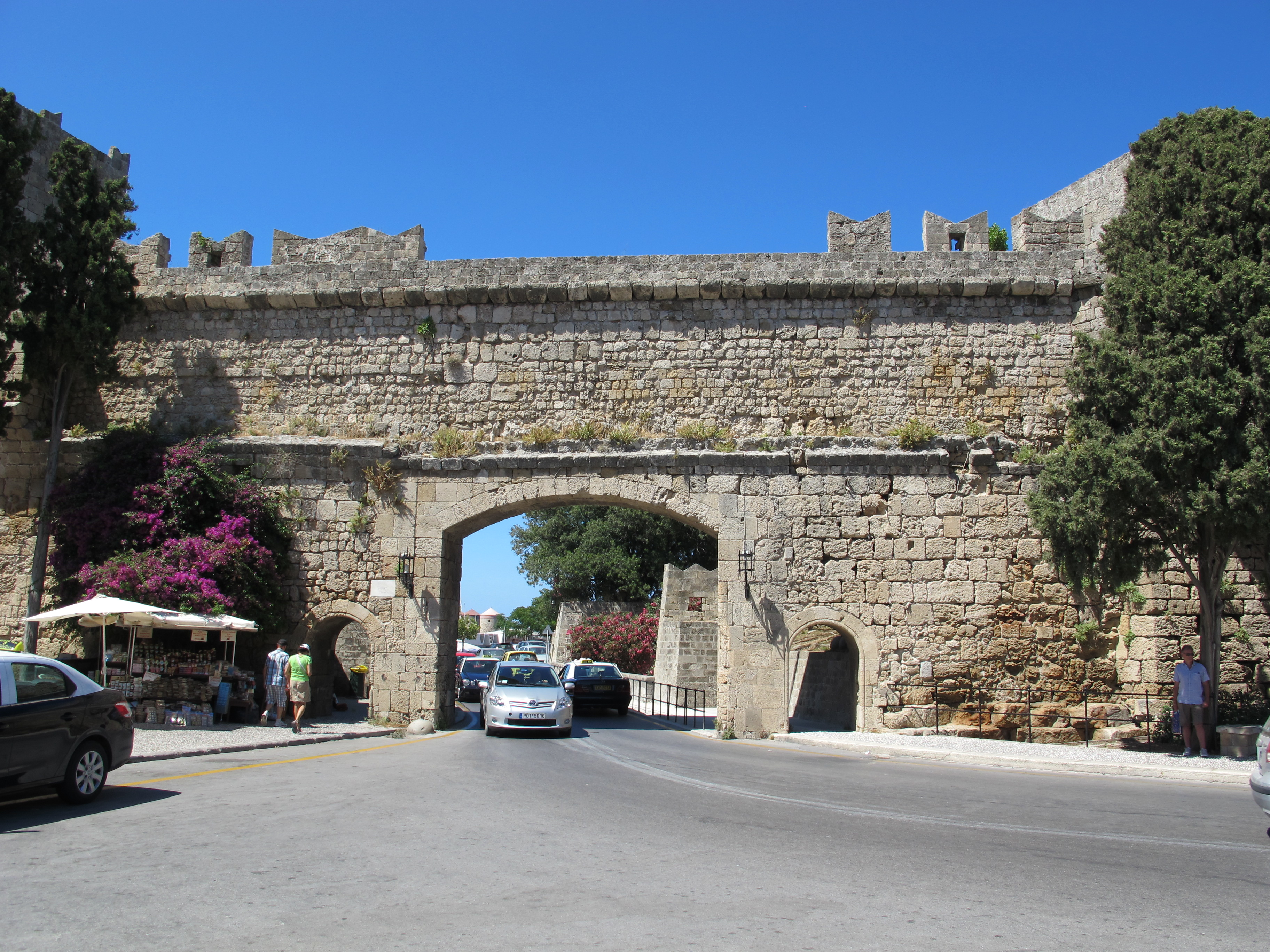 Rodi porta della libertà